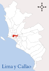 Localización del Cercado de Lima Esta imagen ha sido elaborada por --Edgardo Reyes 17:45 9 mar, 2005 (CET) Categoría:Mapas del Perú (imagen)